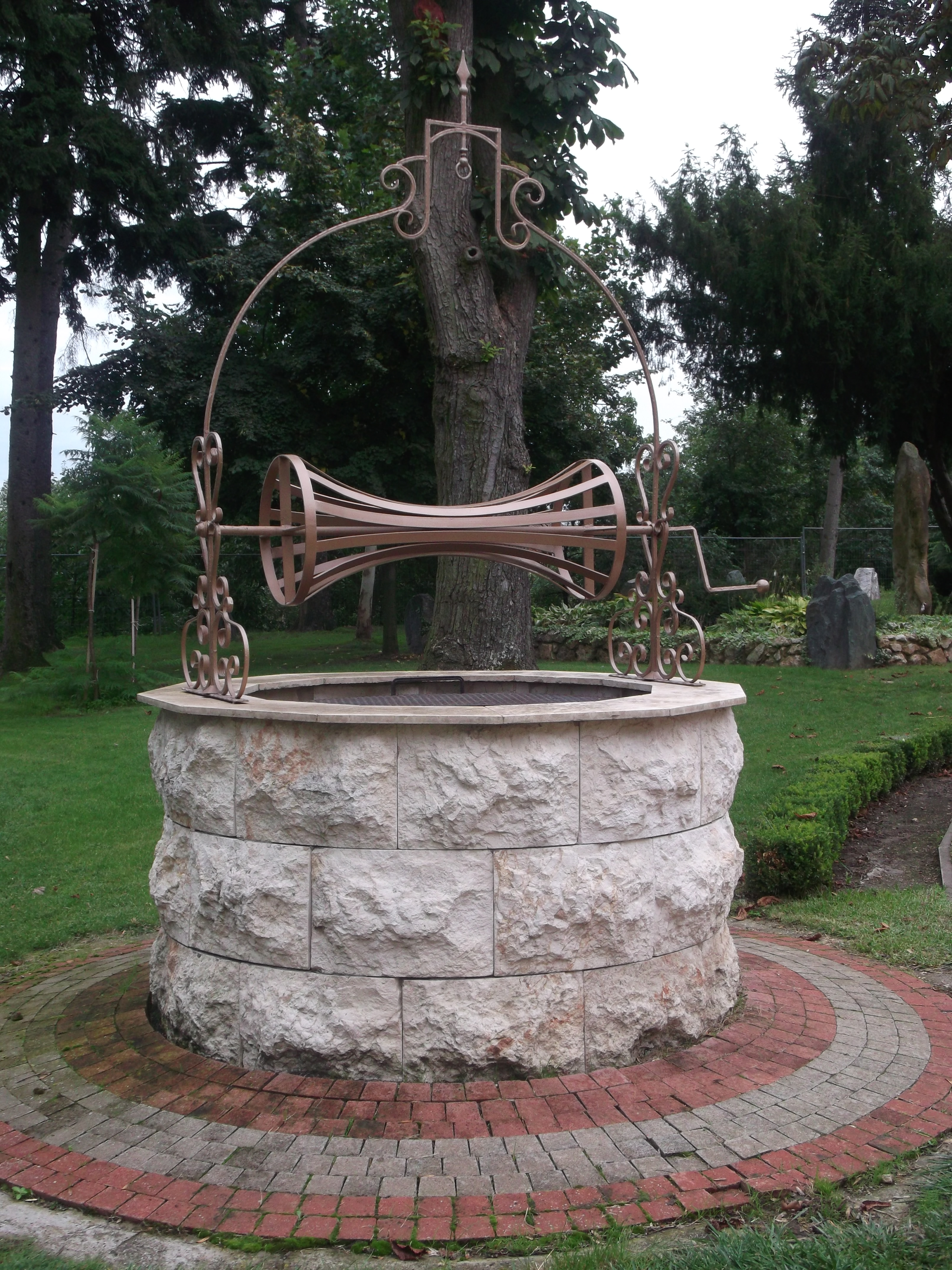 Szapáry Kastély Sorokpolány 2013 Sept. This is a photo of a monument in Hungary. Identifier: 9325